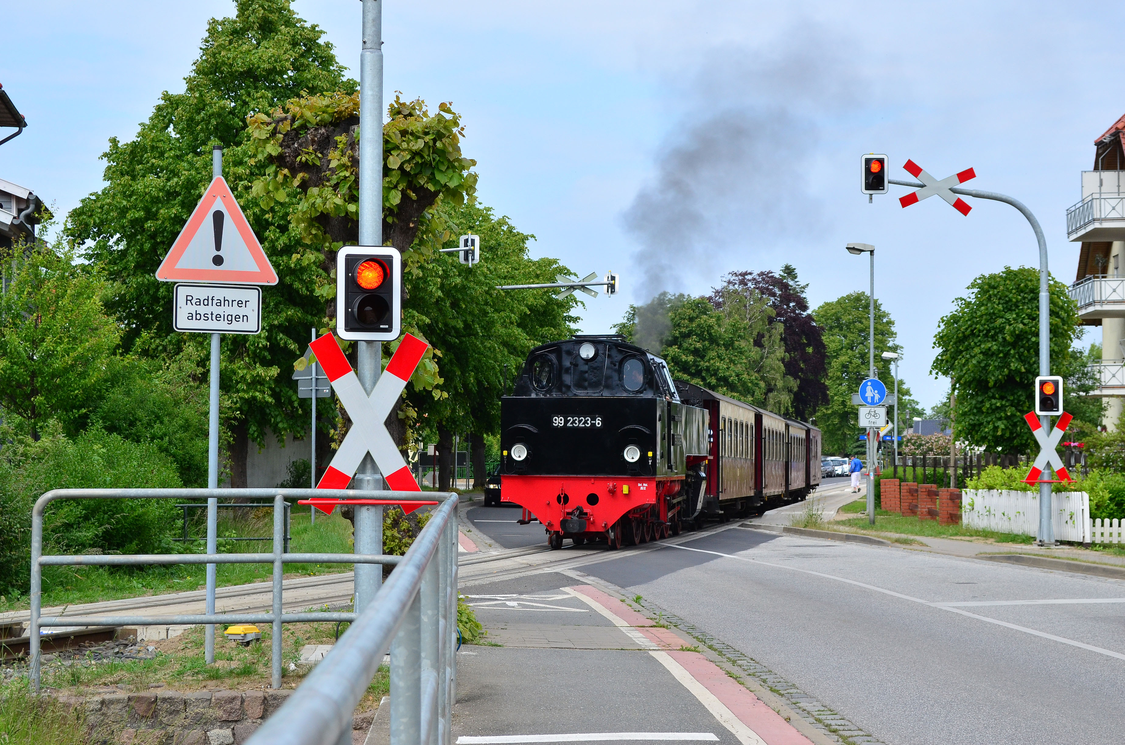 Kühlungsborn, Molli, nach Haltepunkt Mitte 2